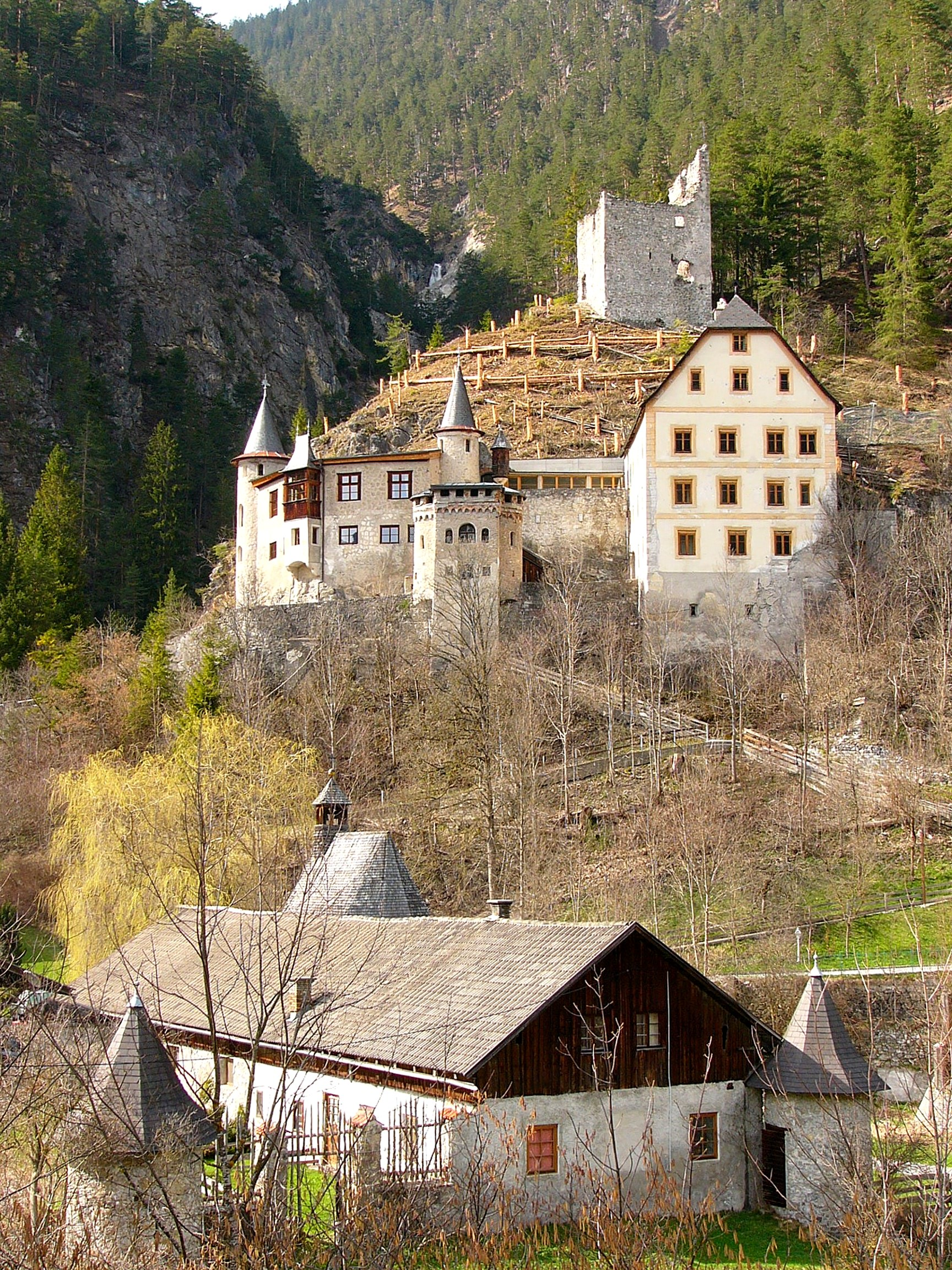 Burgruine Fernstein